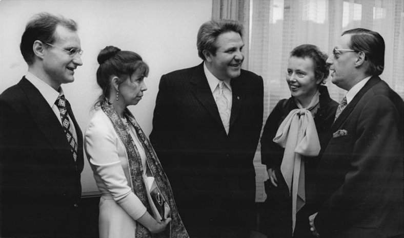 ADN-ZB Reiche-10.2.73 Berlin: Brecht-Ehrung Im Anschluß an eine Festveranstaltung anläßlich des 75.Geburtstages Berthold Brechts gab das Ministerium für Künste der DDR für geladene Gäste zu Ehren der "Brechtwoche der DDR 1973" einen Empfang. Zu den Gästen gehörten u.a. auch die Mitglieder des Berliner Ensembles Eckehard Schall und Barbara Brecht-Schall, der Schirmherr des Brecht-Komitees der DDR, Kulturminister Hans-Joachim Hoffmann, die Intendantin des Berliner Ensembles Ruth Berghaus und der Schauspieler des Berliner Ensembles Norbert Christian (v.l.n.r.)